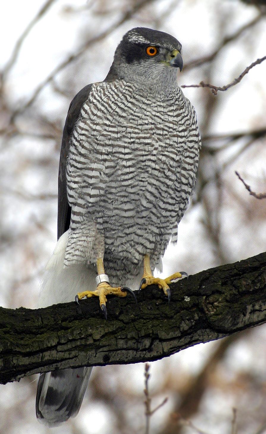 Northern Goshawk Accipiter gentilis gentilis, adult male, Berlin, Bezirk (district) Schöneberg, March 2006